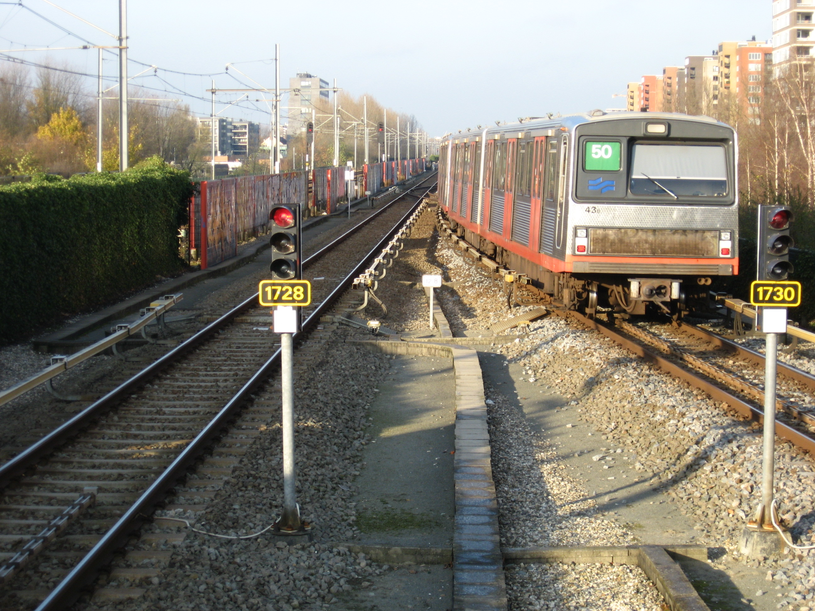 metrolijn 50 trein bij Station Heemstedestraat in Nieuw-West